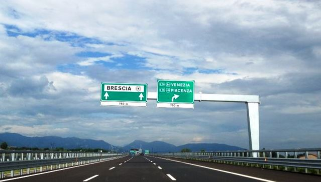 L’autostrada A35 nel territorio comunale di Rovato, poco prima dell’uscita per la SP 19 (futura A21 racc).